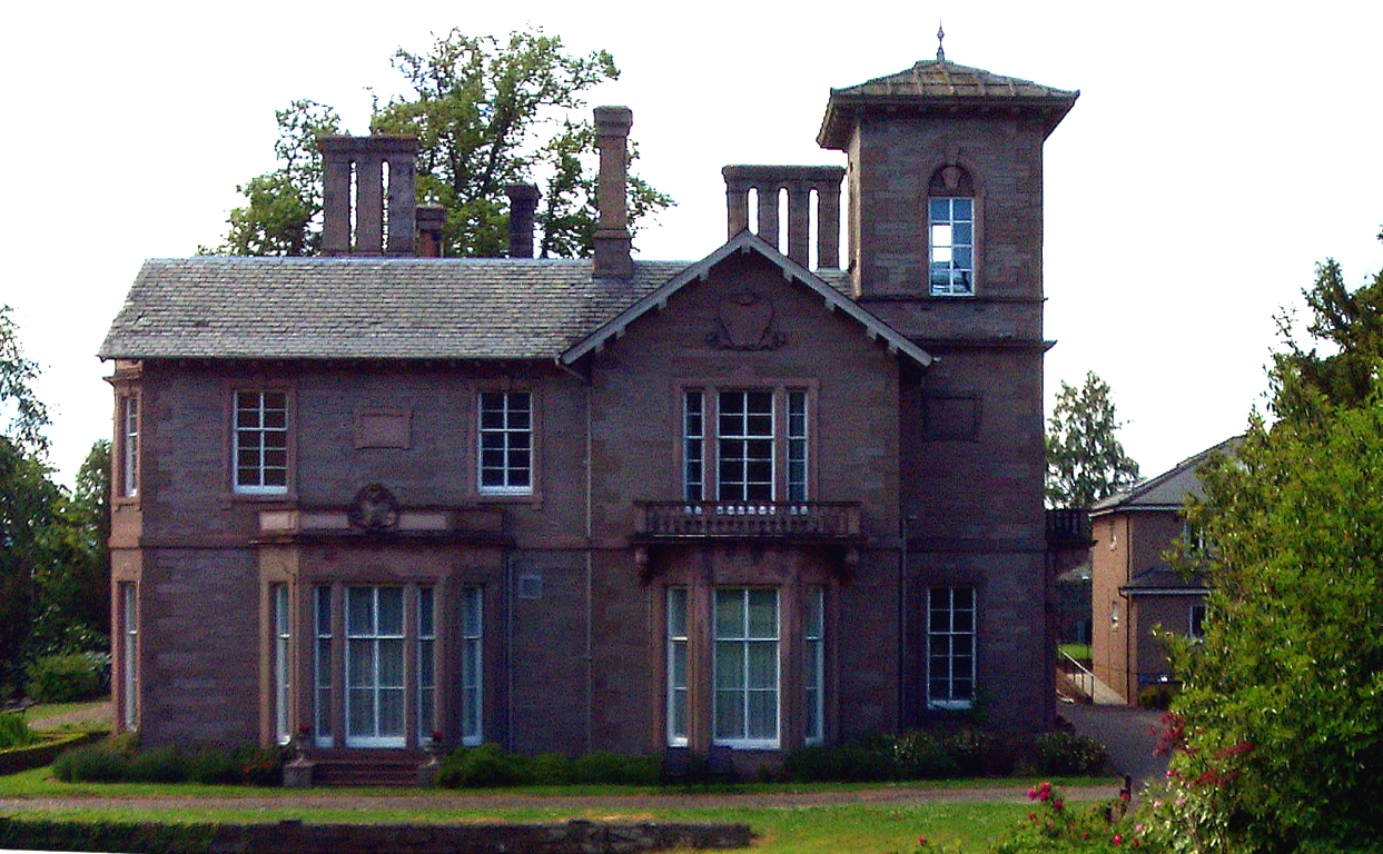 Bowerswell. La casa della famiglia Gray. Kinnoull Hill